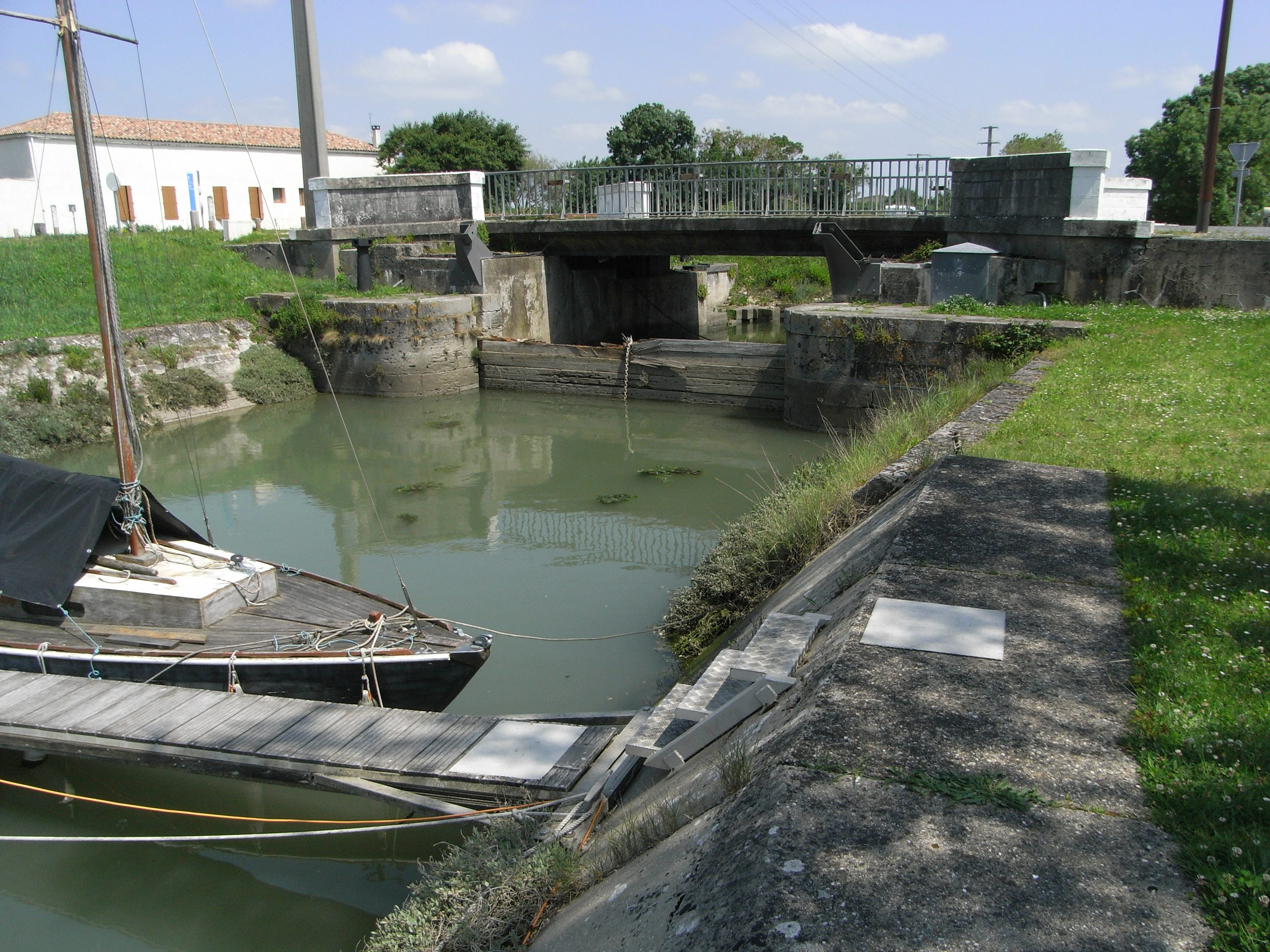 Dernière écluse à Marennes (17) du Canal de la Charente à la Seudre (via le chenal de Marennnes)